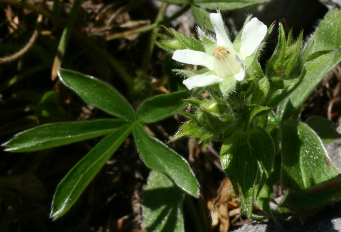 Potentilla_caulescens (Cinquefoglia penzola) Giardino Alpino Antonio Segni (loc. Rifugio Vazzoler) Taibon Agordino (BL), quota 1714 m s.l.m.